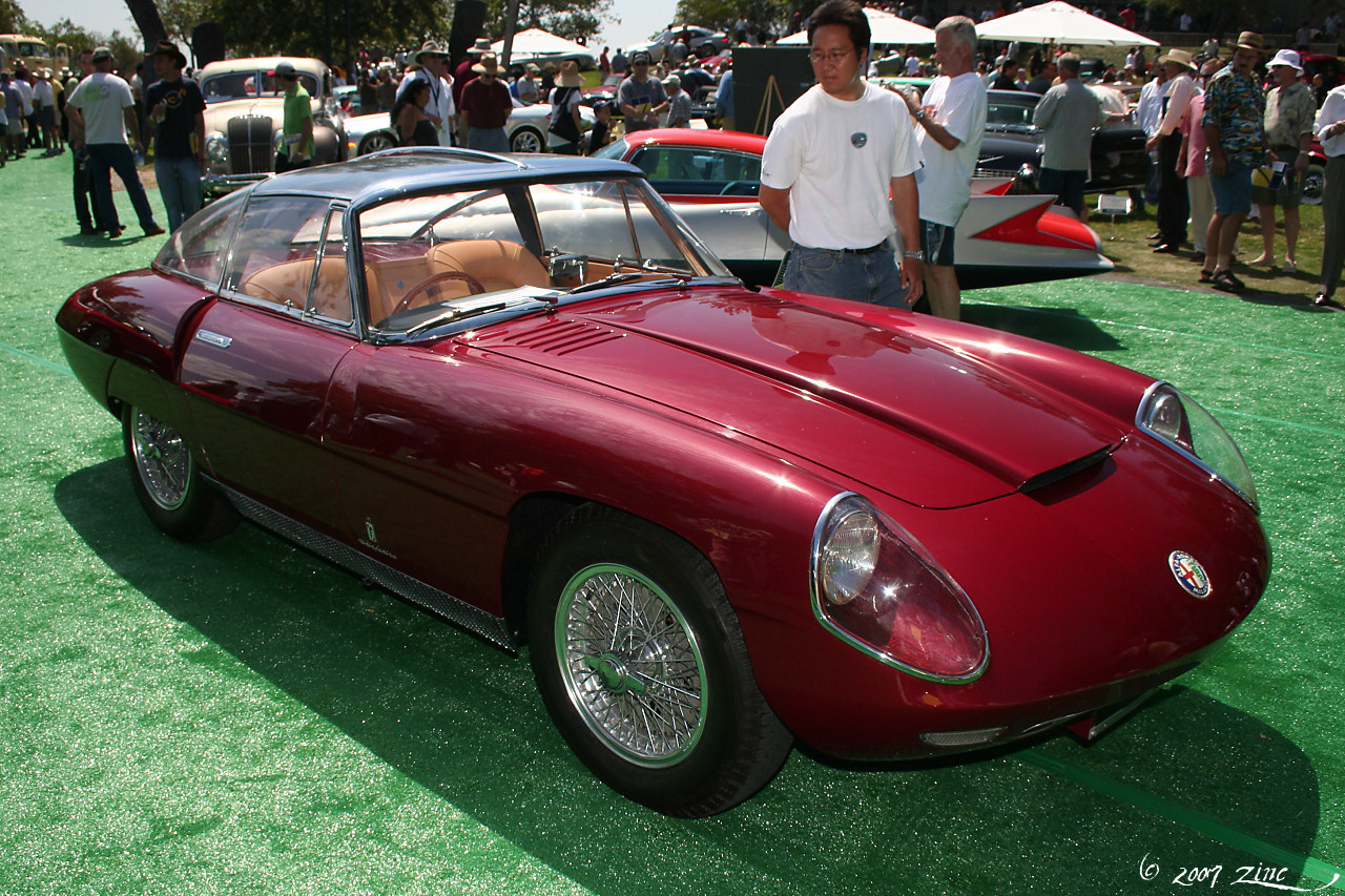 Pasadena Art Center Car Classic, July 7, 2007